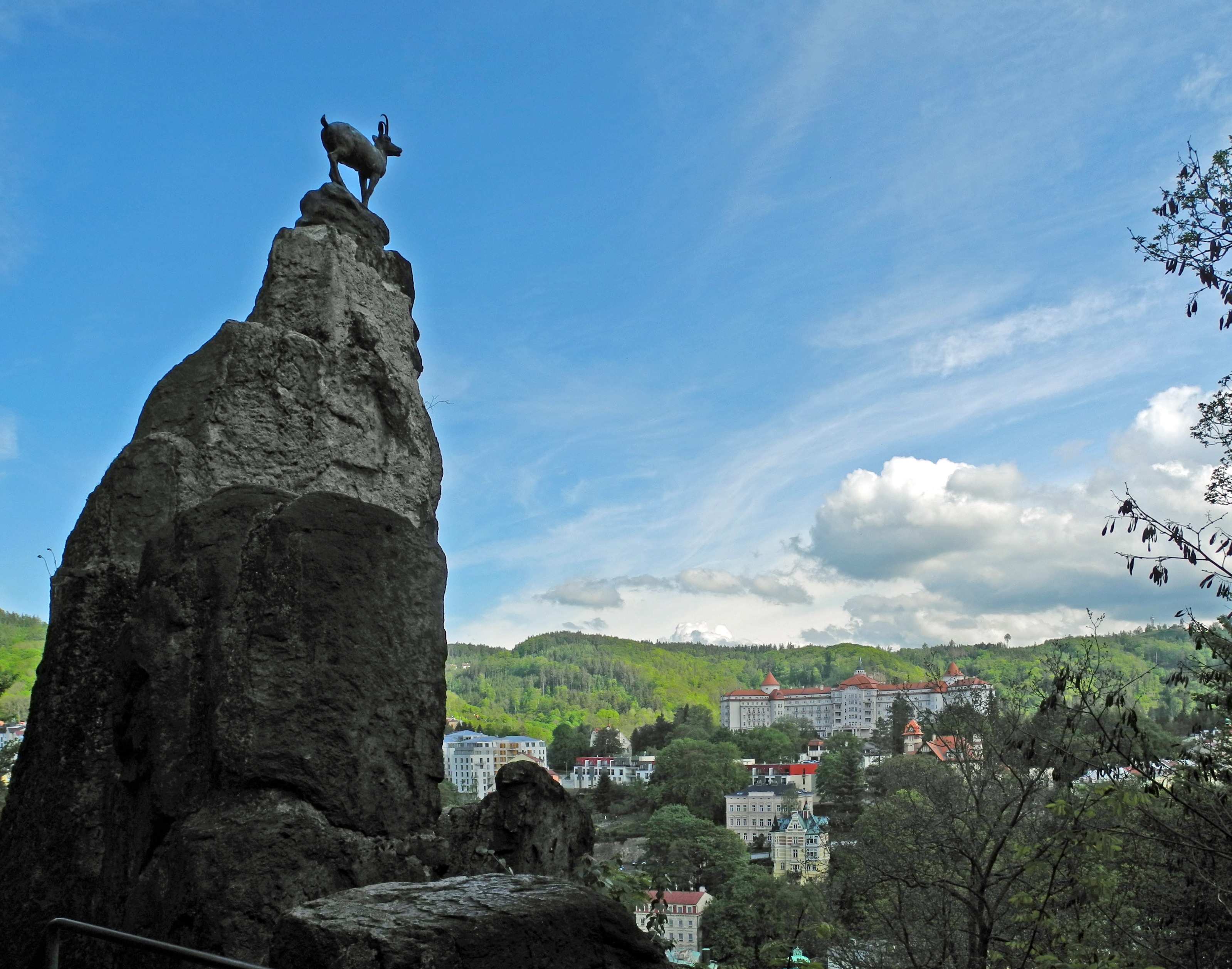 Statue der Gemse am Hirschsprung mit Blick auf Karlsbad (Karlovy Vary)